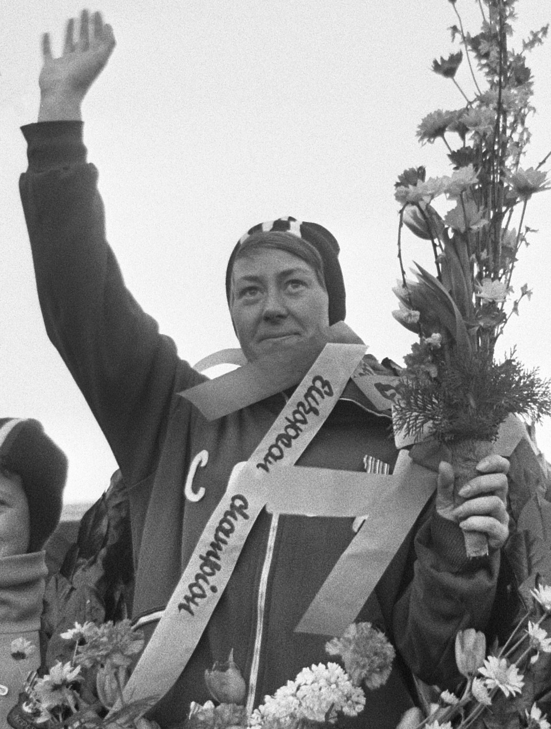 Europese kampioenschappen schaatsen voor dames Heerenveen Huldiging Europees kampioene met bloemen. Nina Statkewitsj